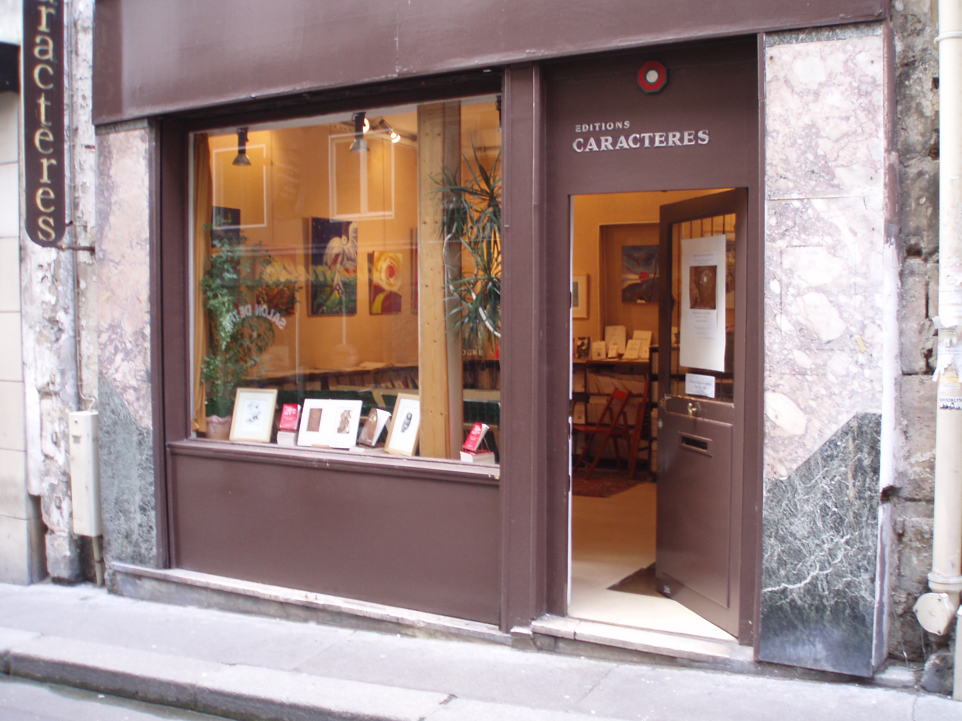 Editions Caractères, 7 rue de l'Arbalètre : Paris 5e arr.